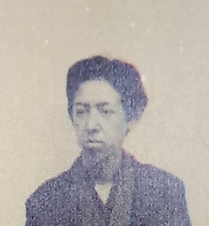 酒井忠美の肖像写真(部分、元々は山口弘達らとの集合写真)。